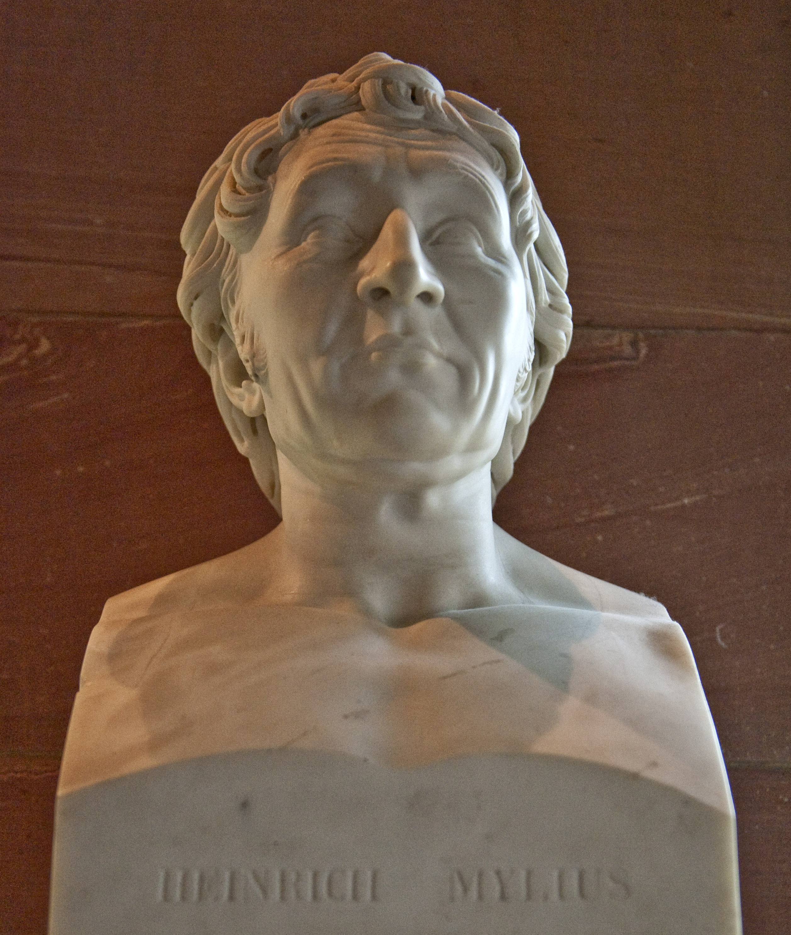 Heinrich Mylius (1769-1854), Förderer der senckenbergischen Lehre, erfolgreicher Kaufmann in Mailand, geboren in Frankfurt, Erbauer der Villa Mylius-Vigoni am Comer See, Namenspatron der Mylius-Straße in Frankfurt-Westend. Büste im Naturmuseum Senckenberg, Frankfurt.